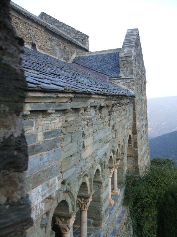 Prieuré de Serrabone : Vue de la galerie du cloître